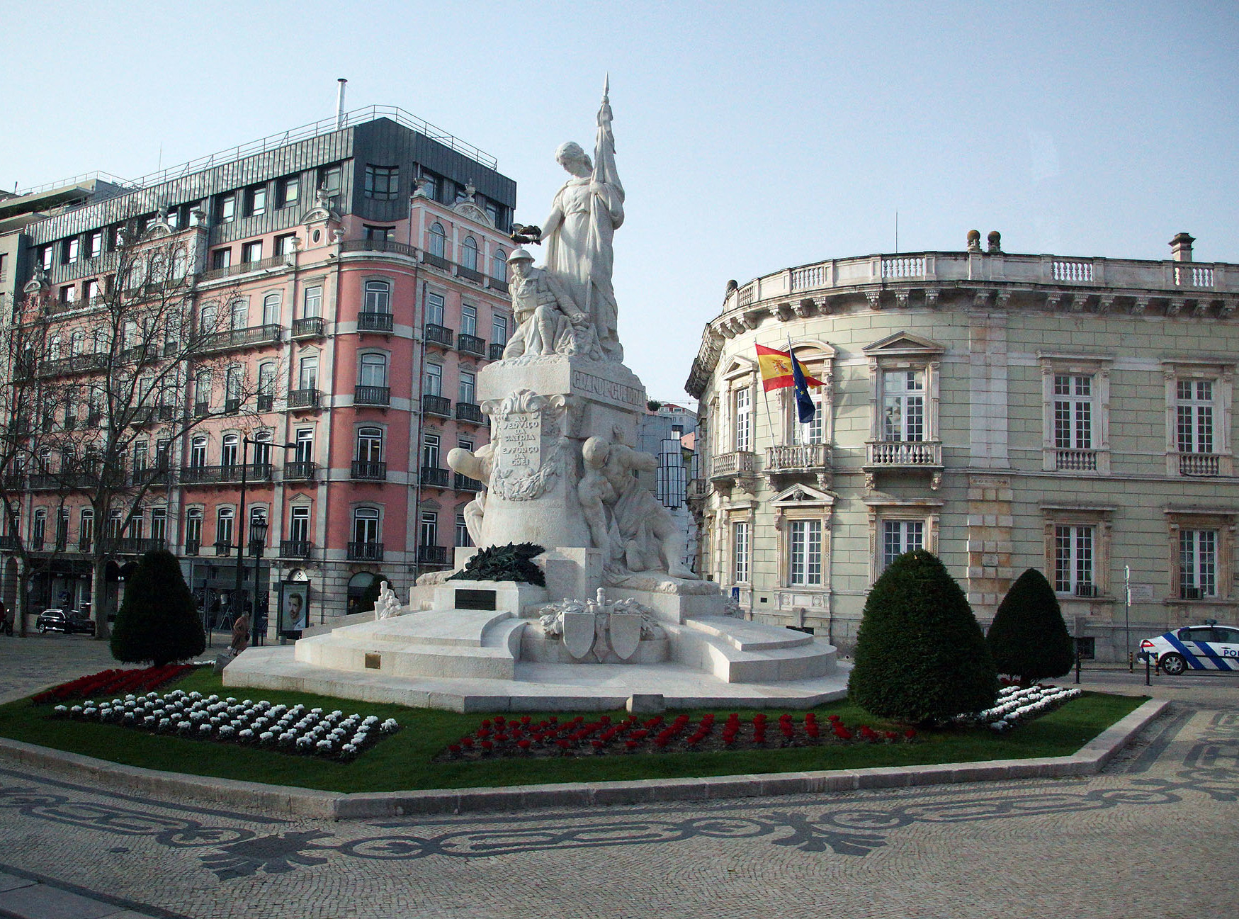 LISSABON / LISBOA LISSABON (Wiki)